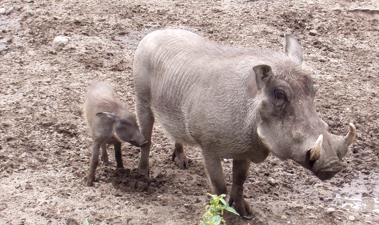 Phacochoerus africanus